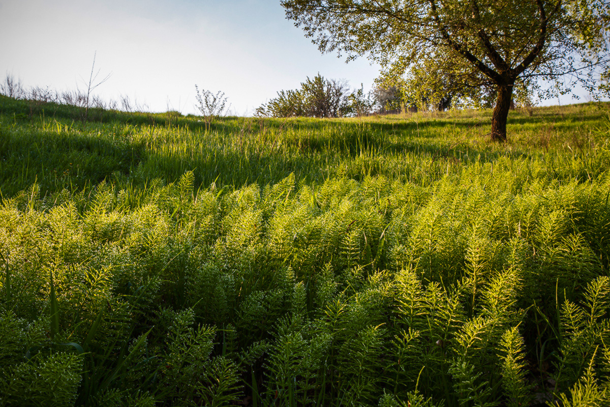 «Хвощ великий», Вишгородський район, Вишгородська міська рада